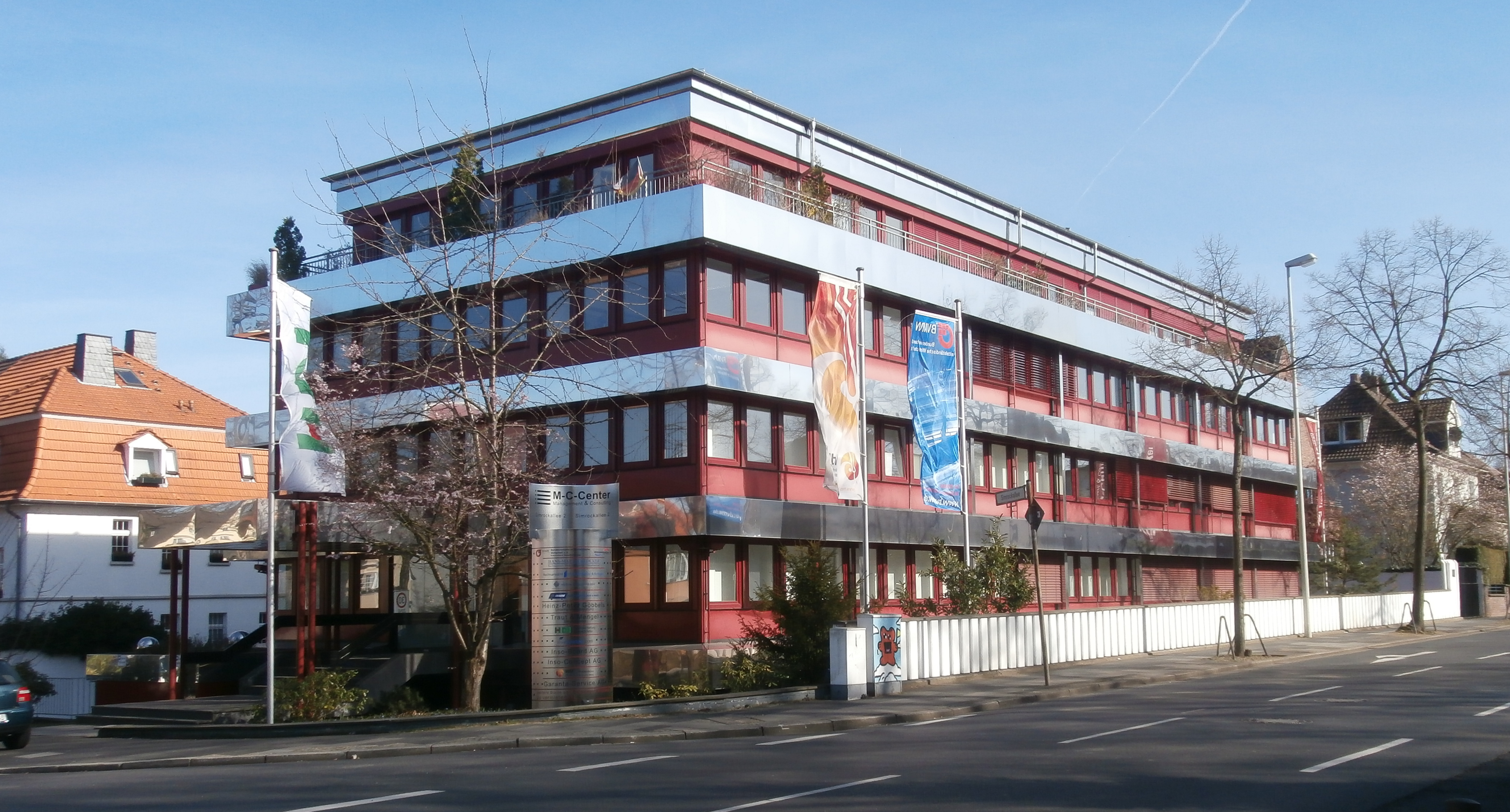 Ehemalige Botschaft des Staates Israel, Simrockallee 2, Plittersdorf, Bad Godesberg: Ansicht von der Ubierstraße